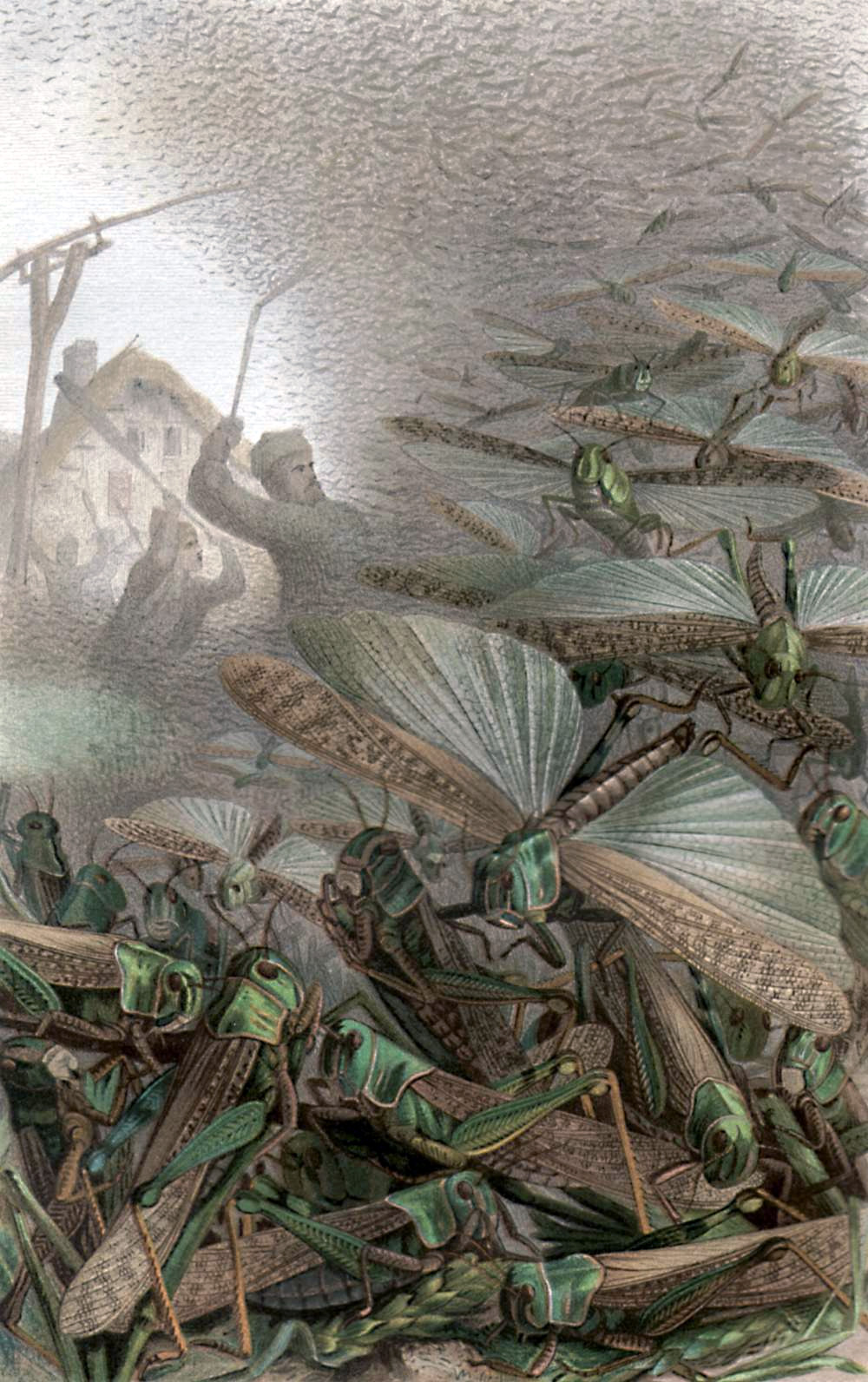 Schwarm der Wanderheuschrecke (Acrididae)